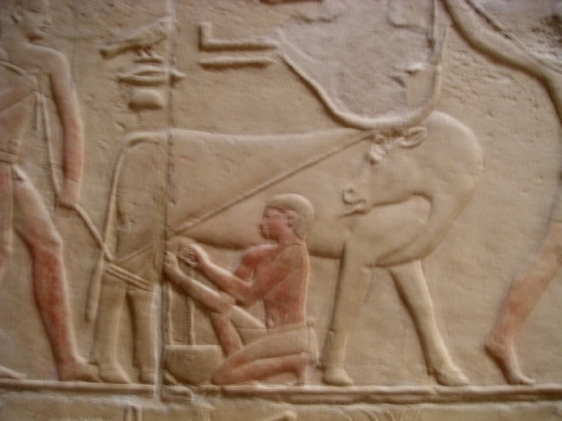 Relief peint du mastaba de Kagemni - Saqqarah - Ve dynastie à VIe dynastie égyptienne